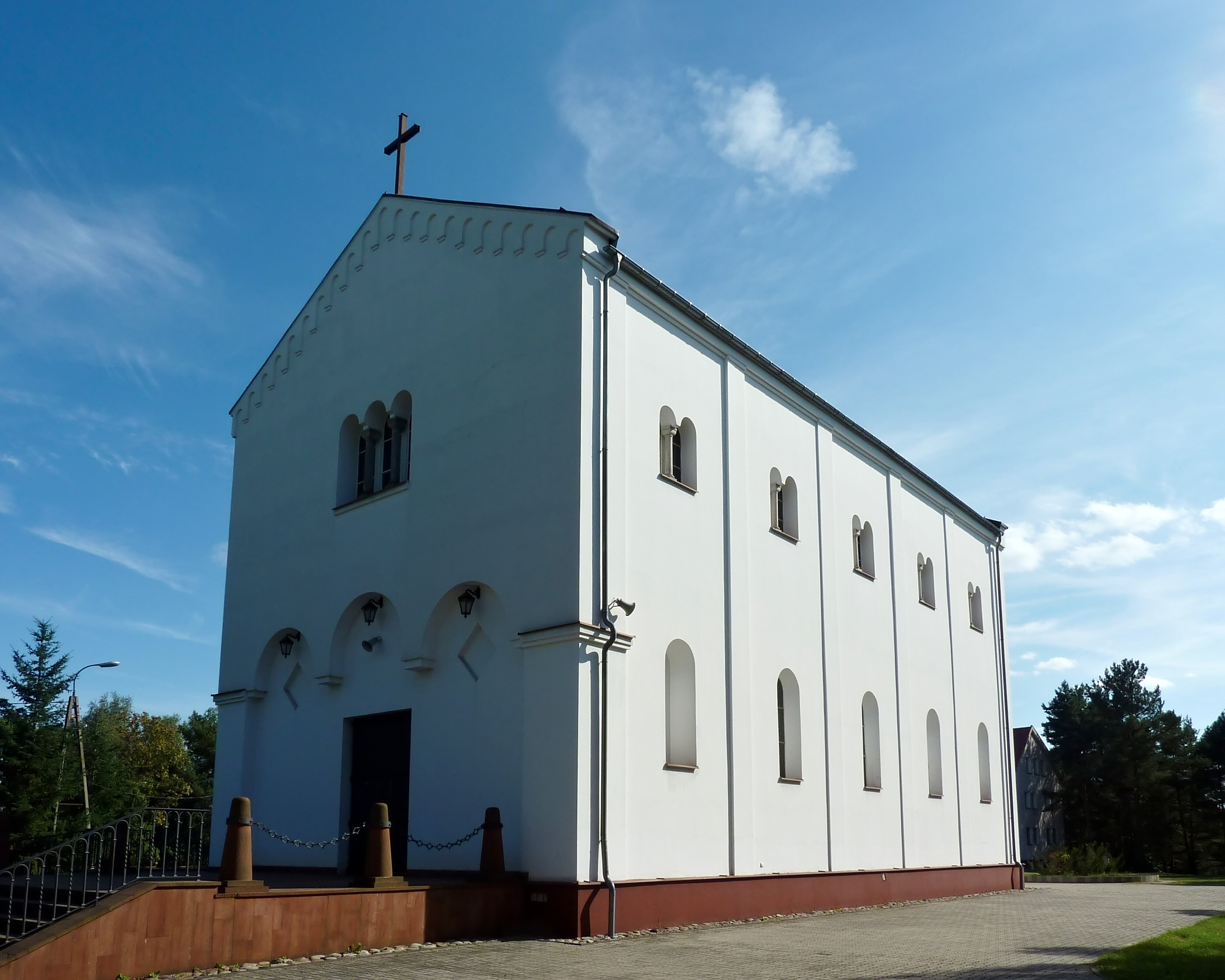 Kościół Opatrzności Bożej w Warszawie (Wesoła).